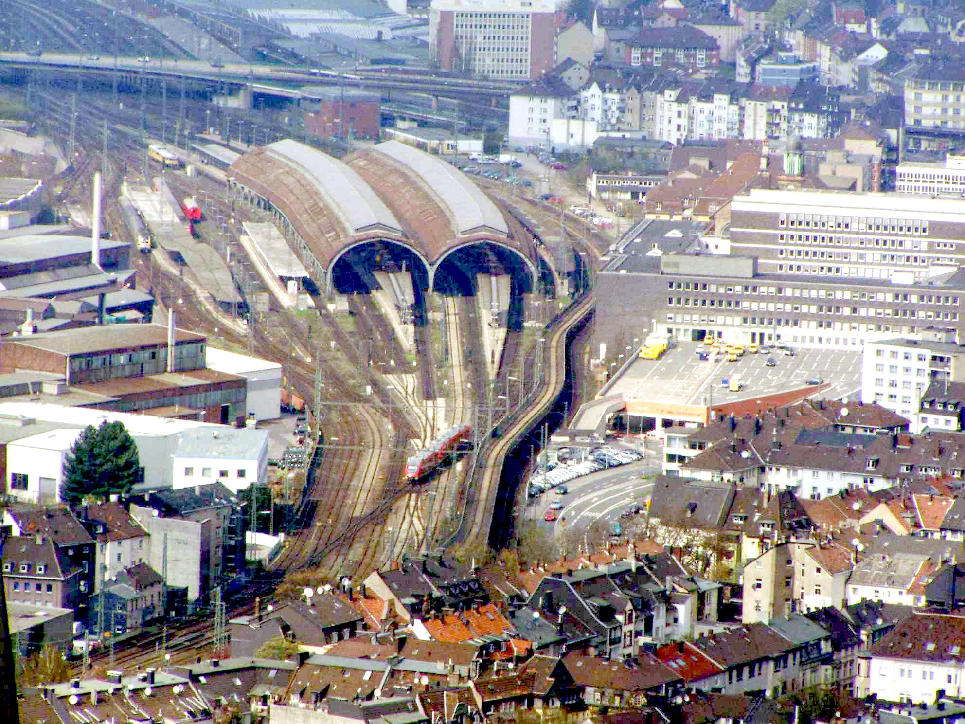 Der Hagener Hauptbahnhof aus der Vogelperspektive vom Eugen-Richter-Turm aus gesehen. Hagen, Nordrhein-Westfalen, Deutschland.